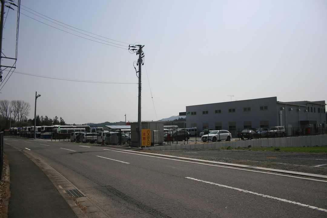 ジェイアールバス関東株式会社白河支店の外観。公道より敷地外撮影。福島県白河市白坂石阿弥陀7-3